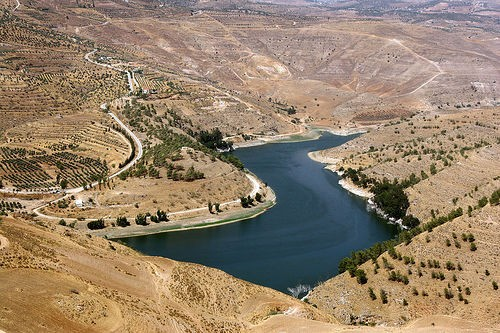 King Talal Dam